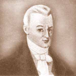 Аблесімов Олександр Онисимович